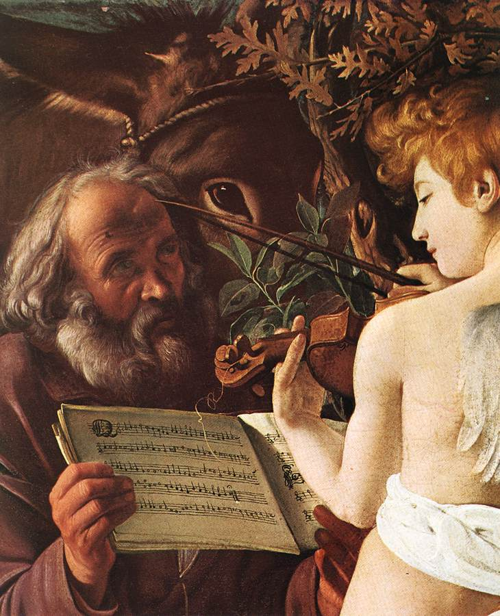 detail